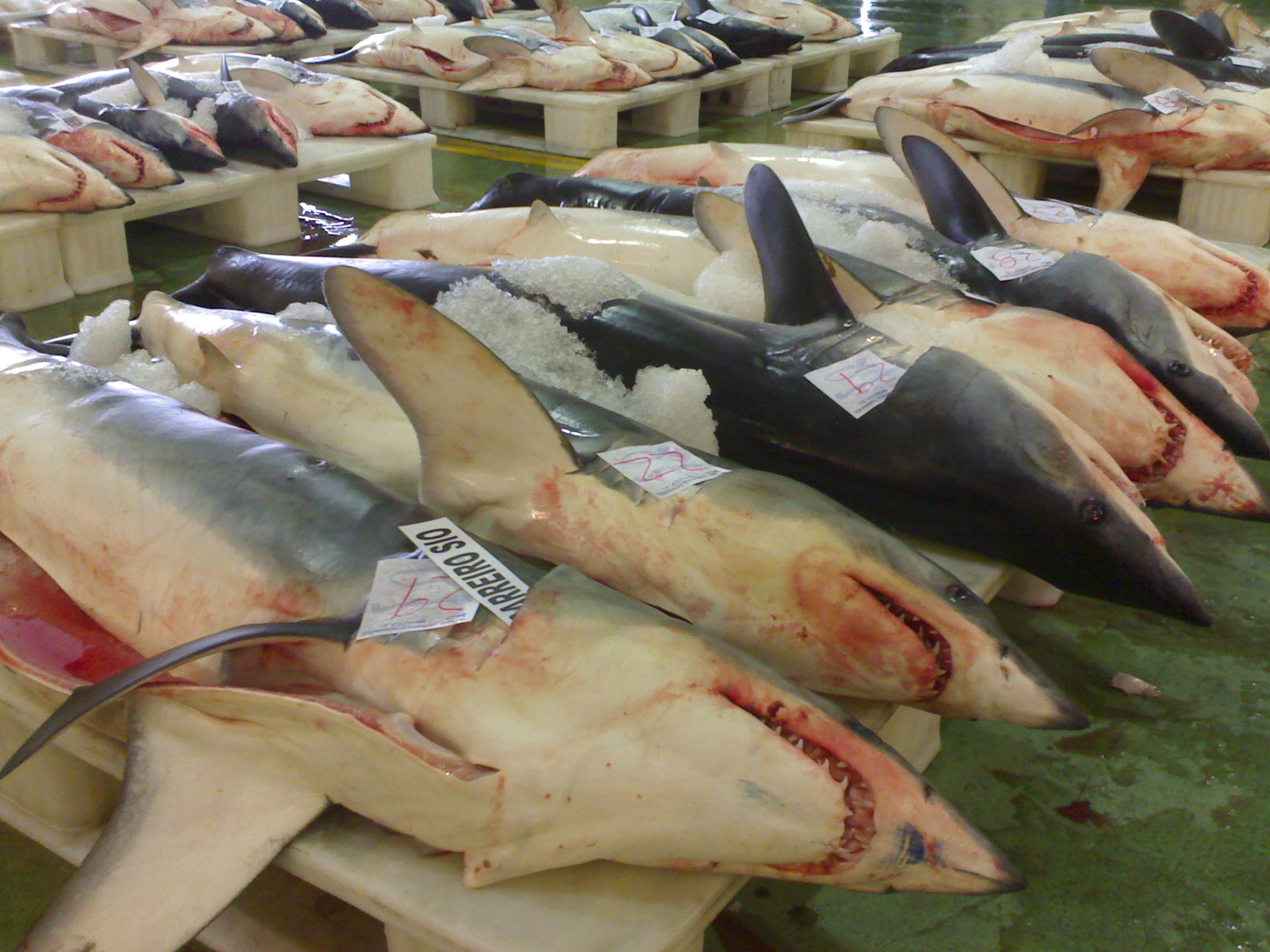 Poxa de marraxo (Isurus oxyrinchus) no porto pesqueiro de Vigo. Foto tomada con un Nokia N-70 y software de Flickr. Disparar y publicar :-)